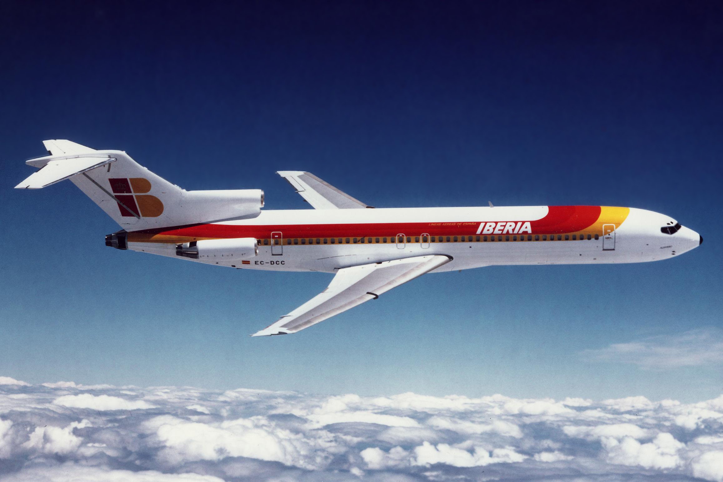 EC-DCC